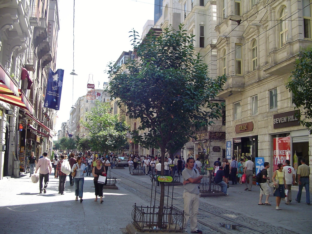 Istiklal Caddesi Istanbul